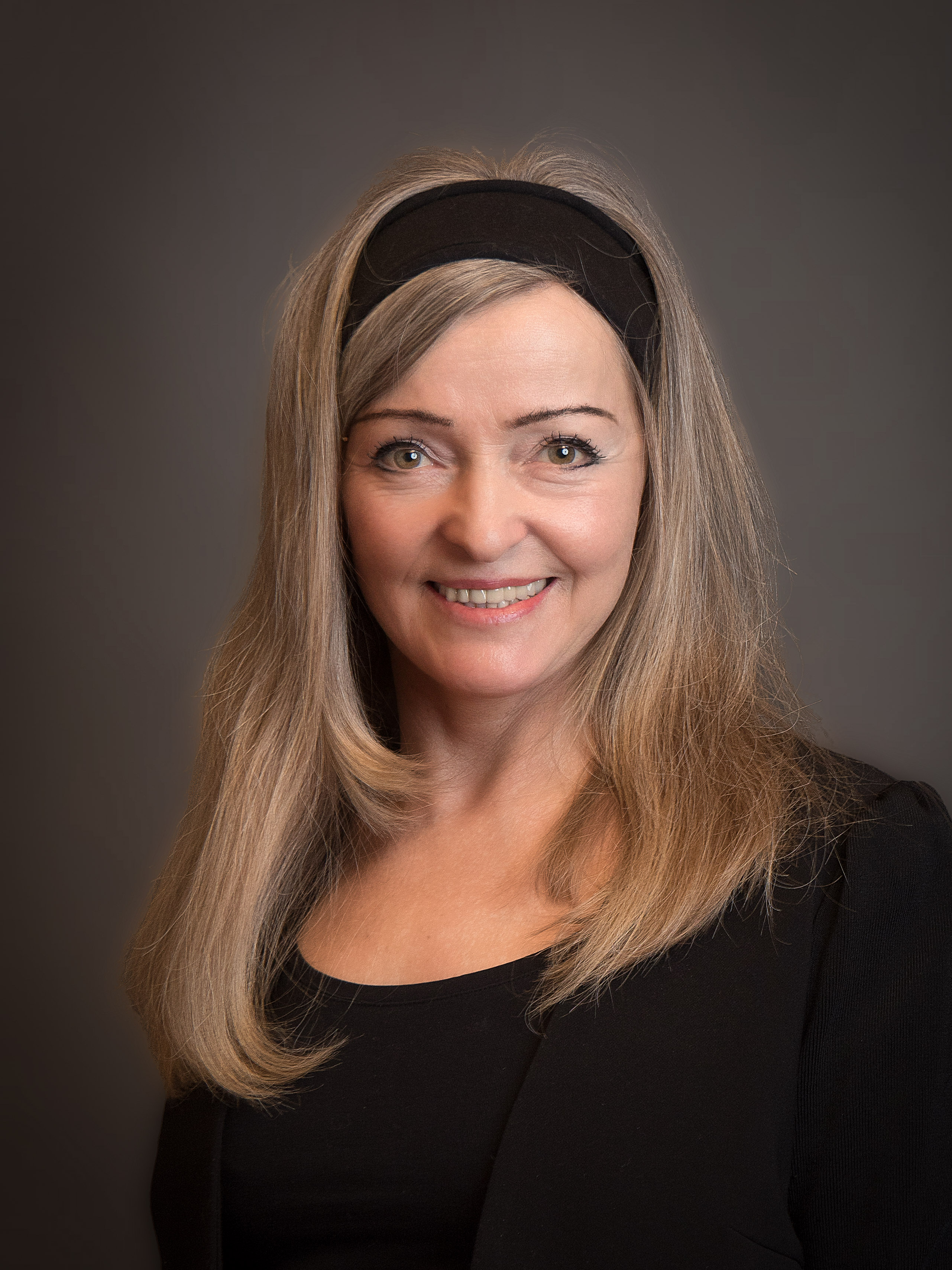 Portrait von Anna Elfriede Ringsgwandl